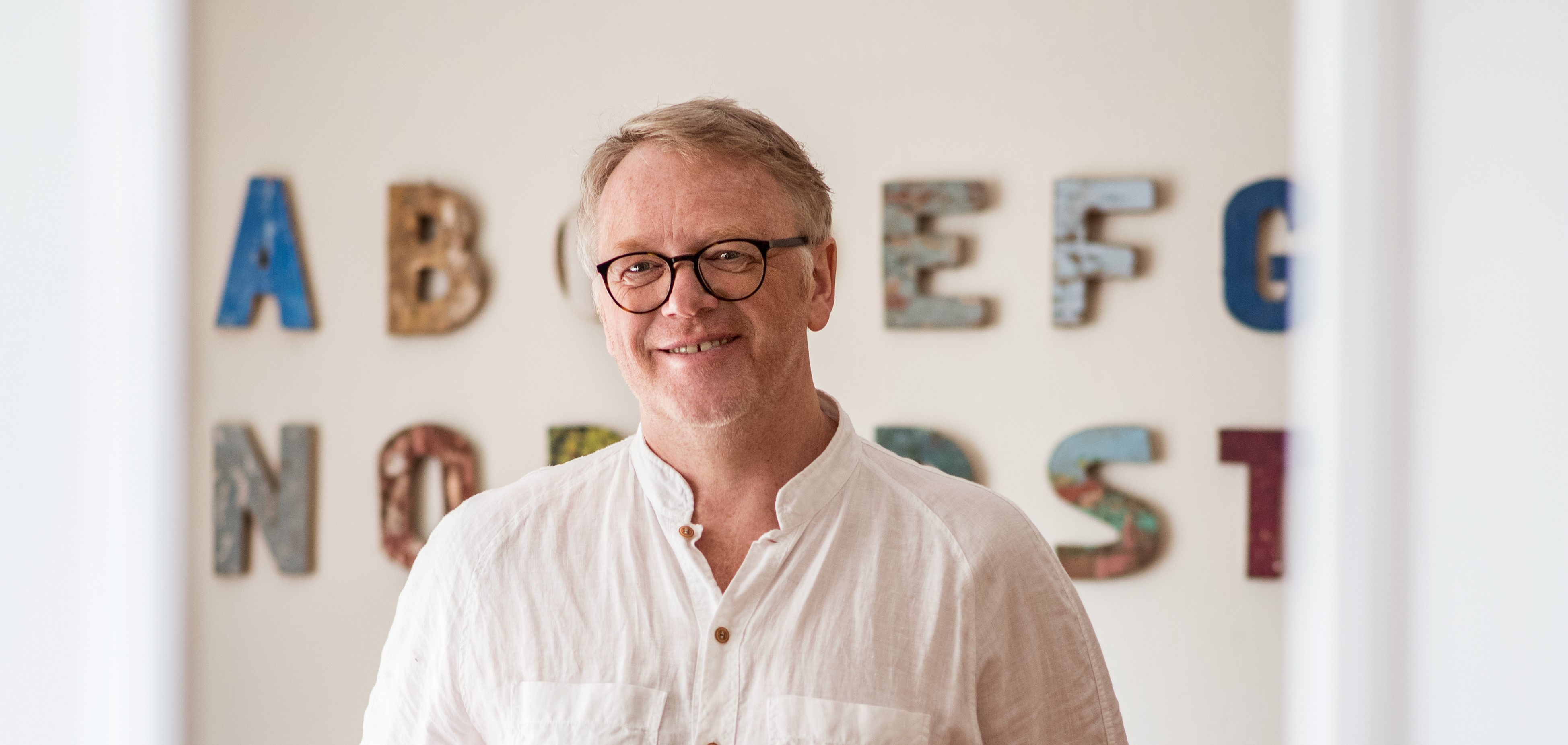 Uwe Birnstein